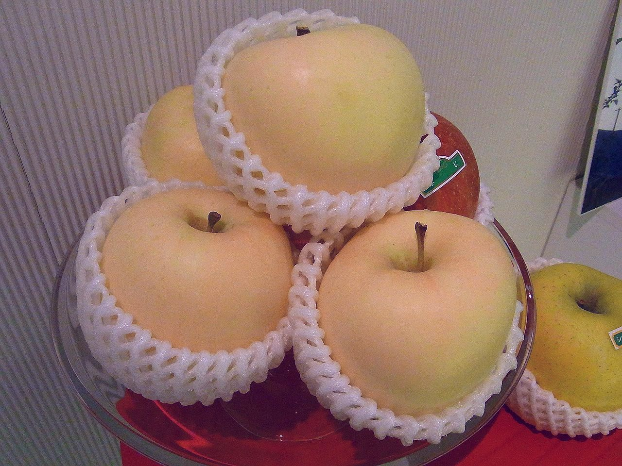 新宿高野 白いリンゴ